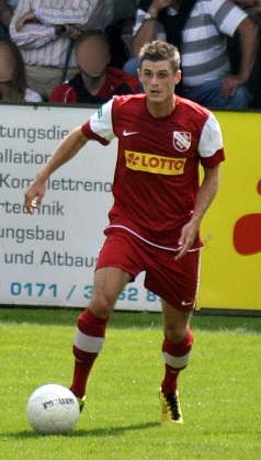 Marc Vucinovic, Fußballprofi. Regionalliga Nord 2011/12